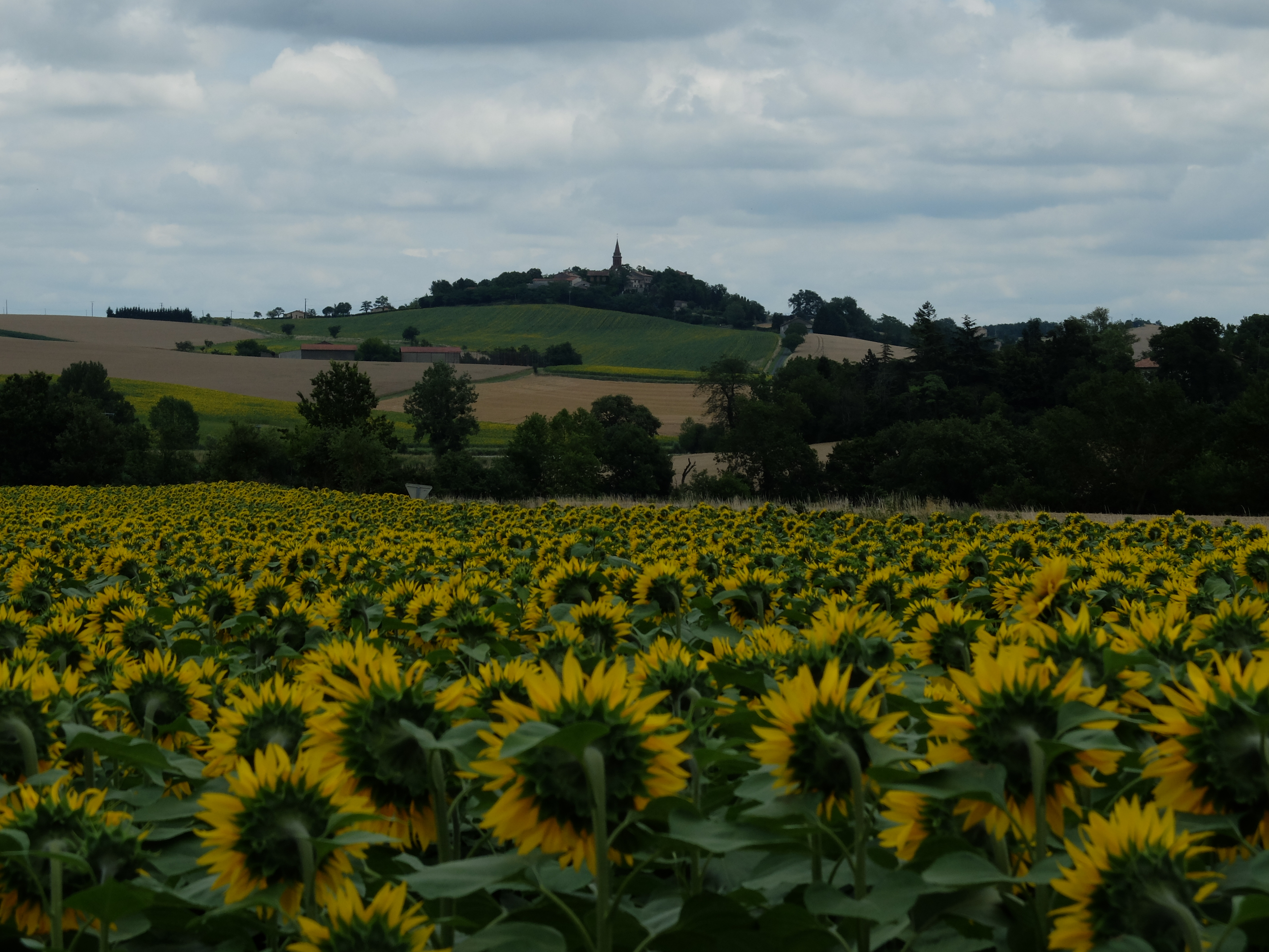 Vue générale de Teyssode